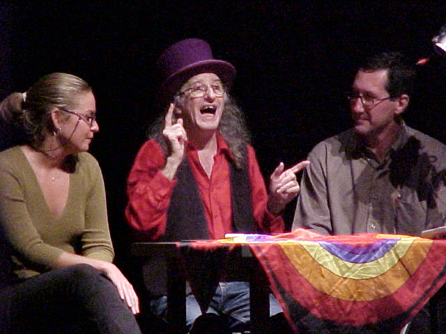 Juan Tamariz durante su actuación en Puerto del Rosario, Fuerteventura el 12/12/2001